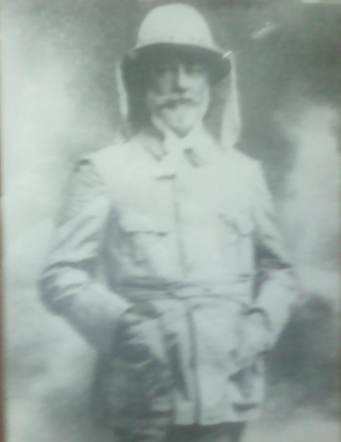 Imagen del gobernador tomada en 1898.